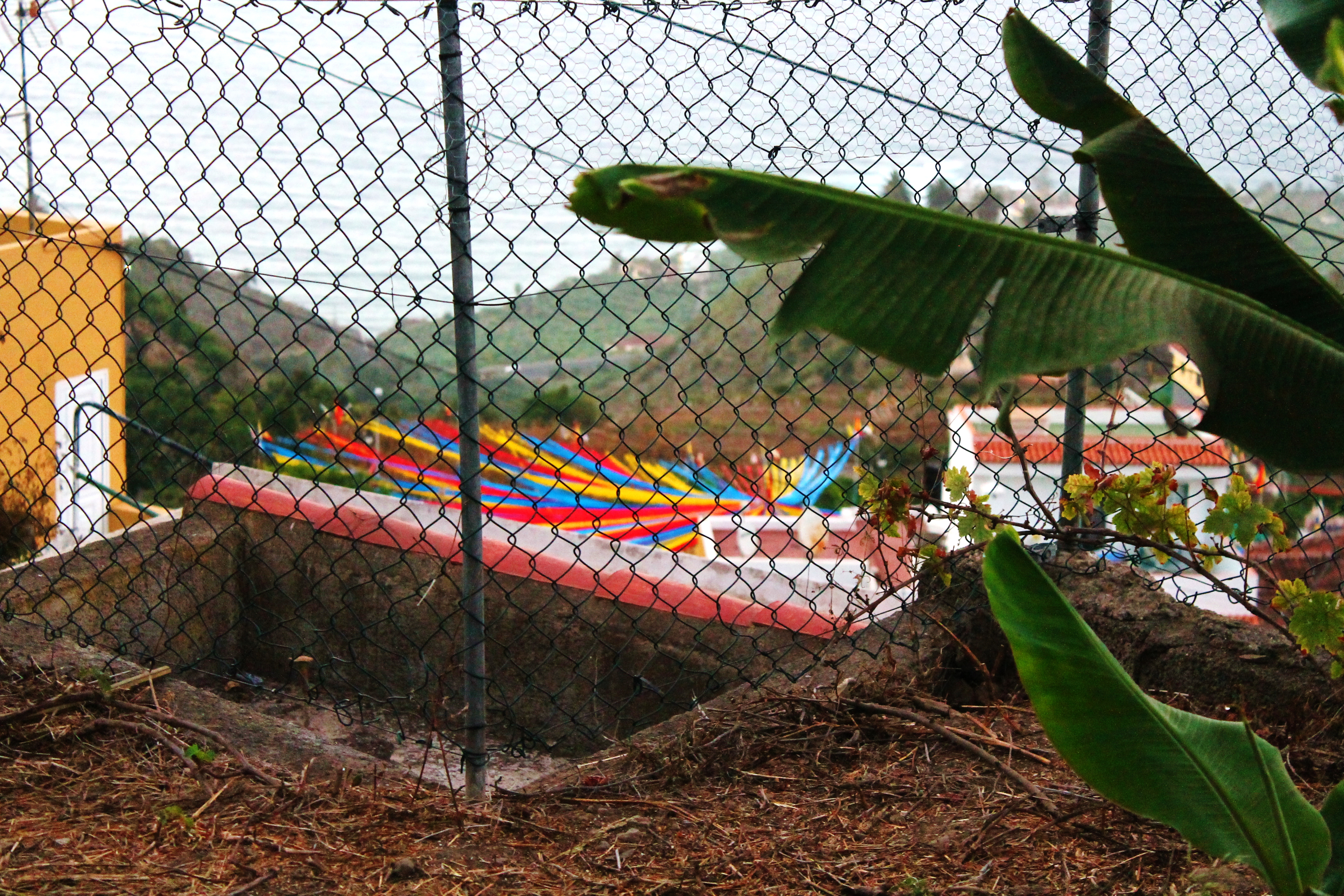 Al fondo la plaza de Tigaiga en días de fiesta